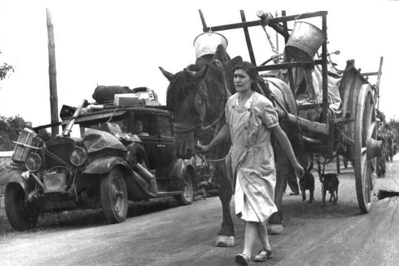 Die Flüchtlingswagen sind hoch beladen mit den wenigen Habseligkeiten. Frankreich, bei Gien. 19.6.1940 L'exode : Les réfugiés avec leurs biens [littéralement "leurs maigres possessions"] empilés dans les voitures le 19 juin 1940 à Gien (France). France, à Gien. 19/06/1940